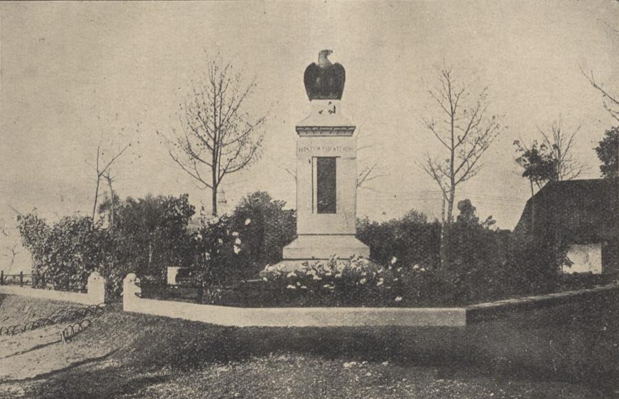 Jn Raszka Skoczów - pomnik ku czci poległych w obronie Śląska Cieszyńskiego